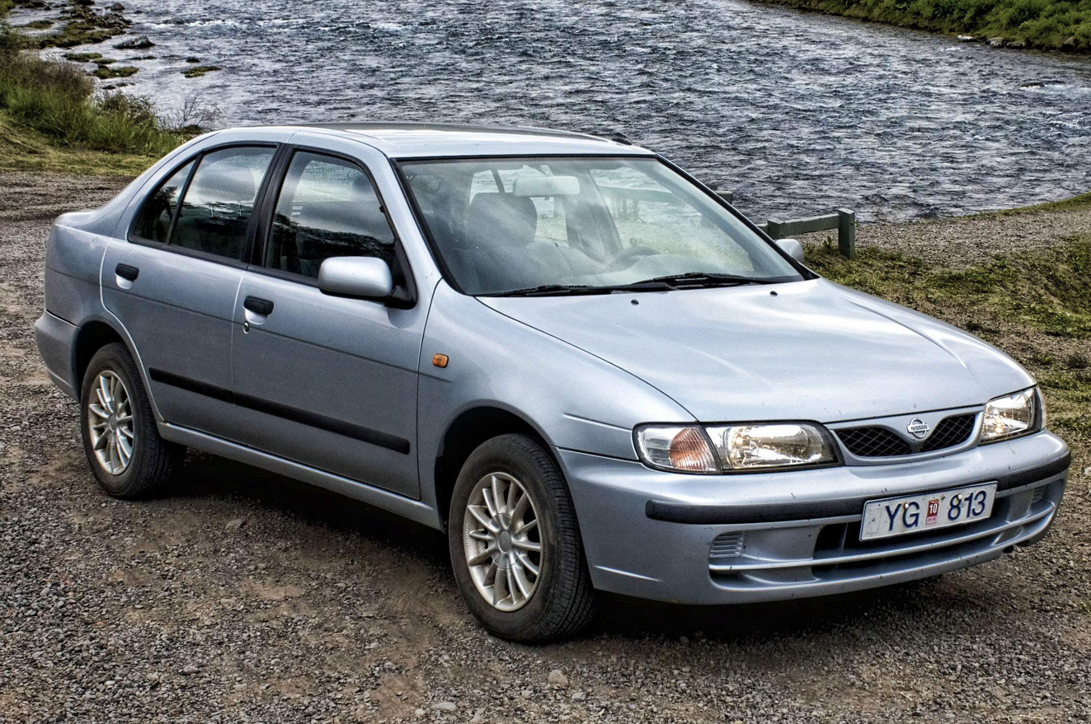 Farartækið mitt.